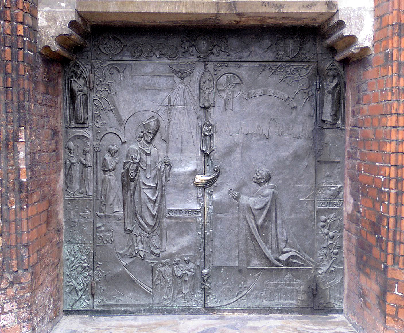 Brązowe drzwi kościoła św.Elżbiety w Gdańsku.